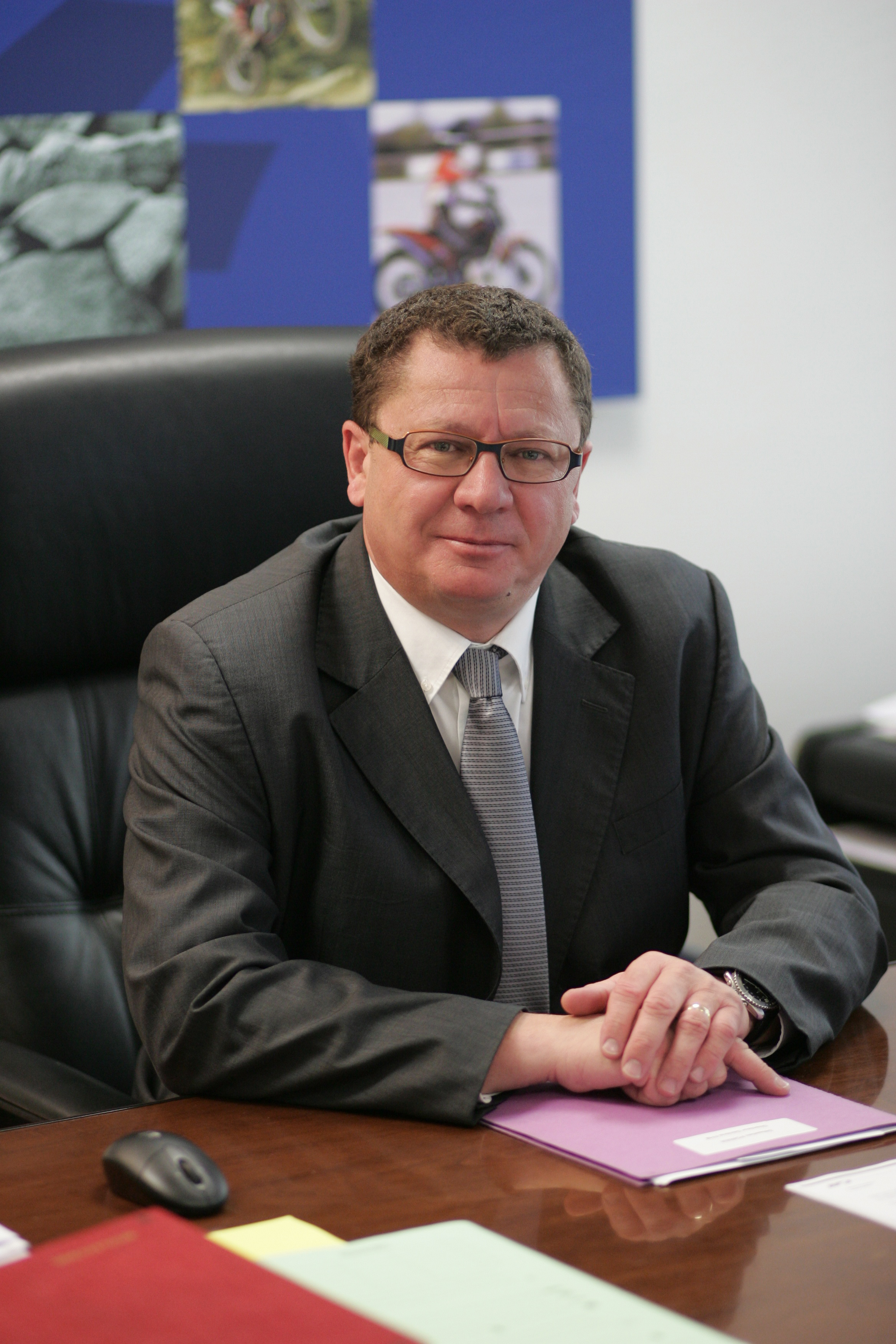 Jacques BOLLE, président de la Fédération Française de Motocyclisme